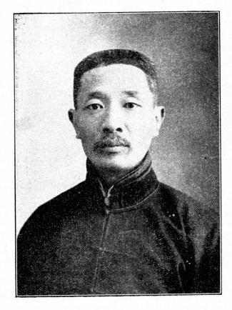 中文（台灣）: 中華民國國會議員